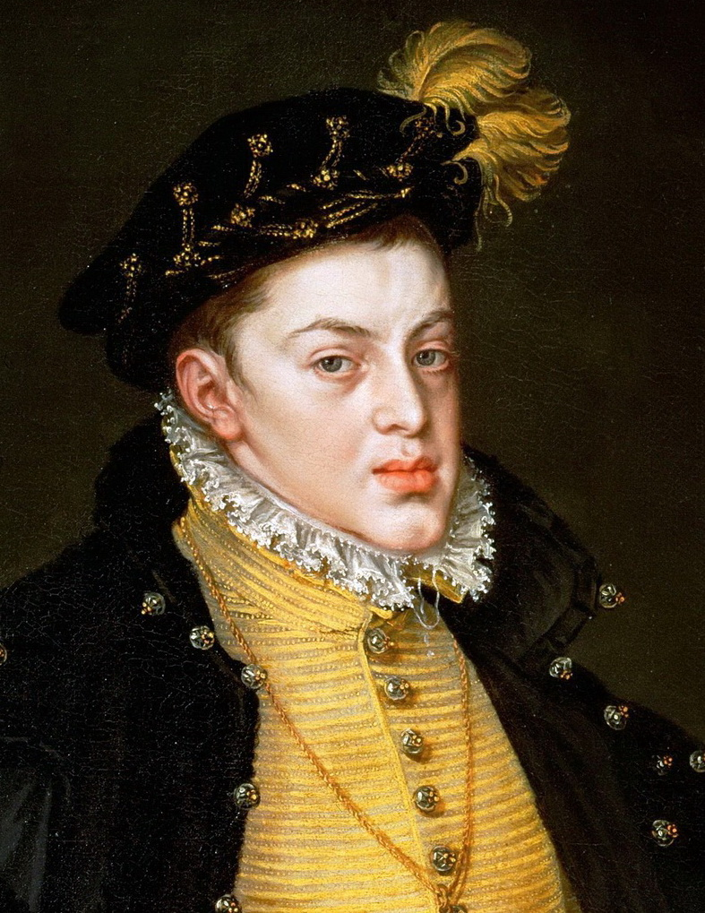 Retrato del príncipe de Asturias Carlos de Austria, que fue el hijo primogénito del rey Felipe II de España y de la reina María Manuela de Portugal, primera esposa de Felipe II.